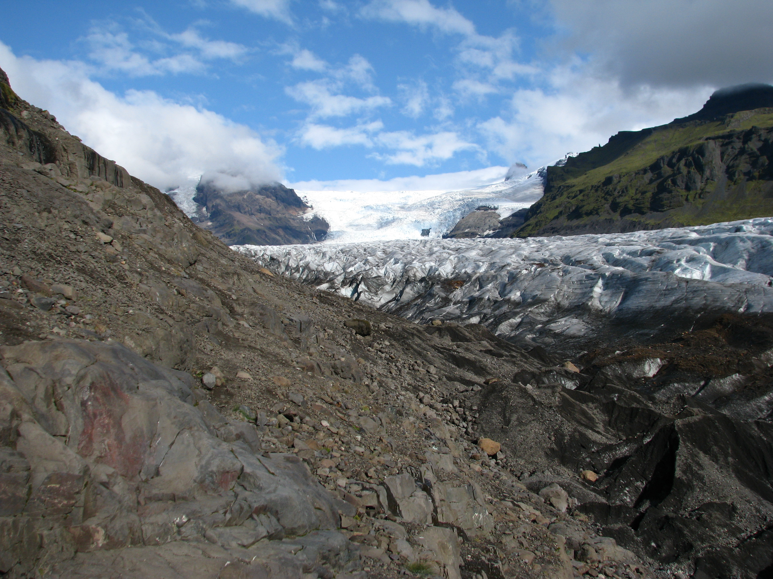 Svínafellsjökull, glacier, Iceland